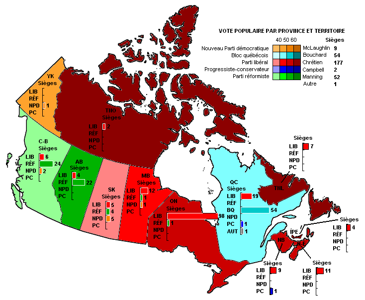 Carte du Canada démontrant le vote populaire lors de l'élection de 1933 avec barres graphiques démontrant le total des sièges de chaque province et territoire